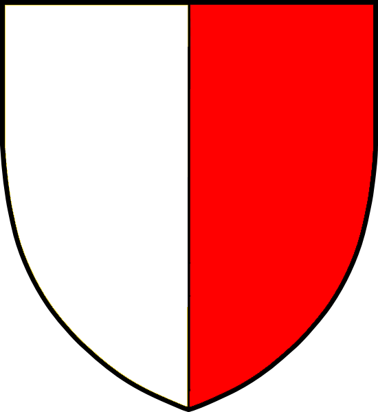 Vapensköld för danska adelsätten Rantzau